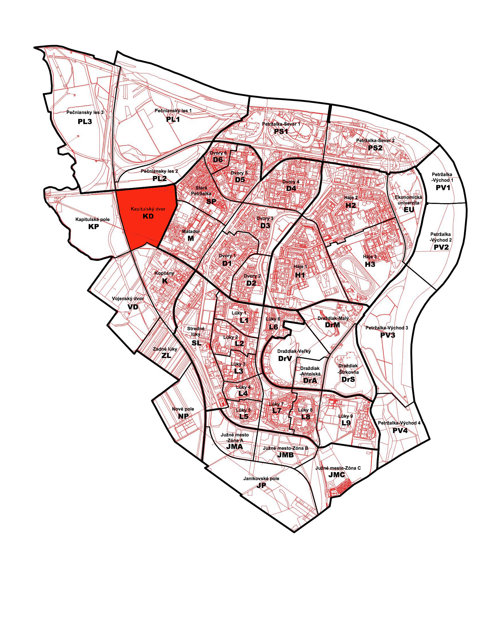 Poloha miestnej časti Petržalky